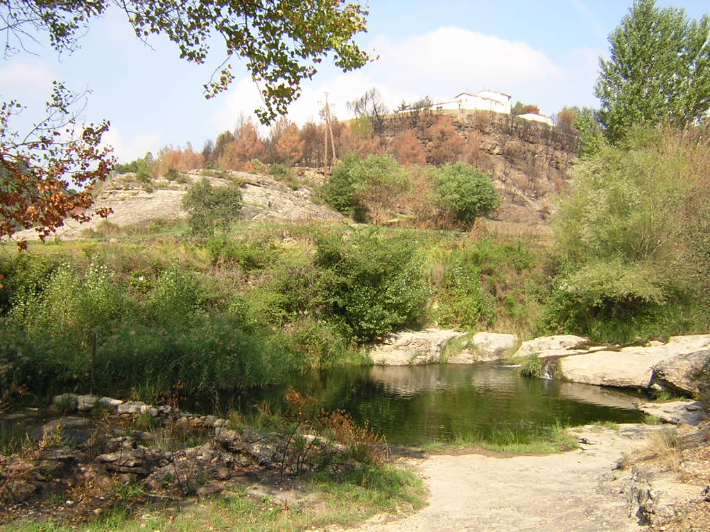 El Gorg de Saladic (Monistrol de Calders, Moianès)